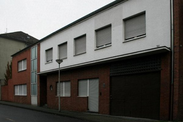 Denkmal Nr. 359 in Viersen